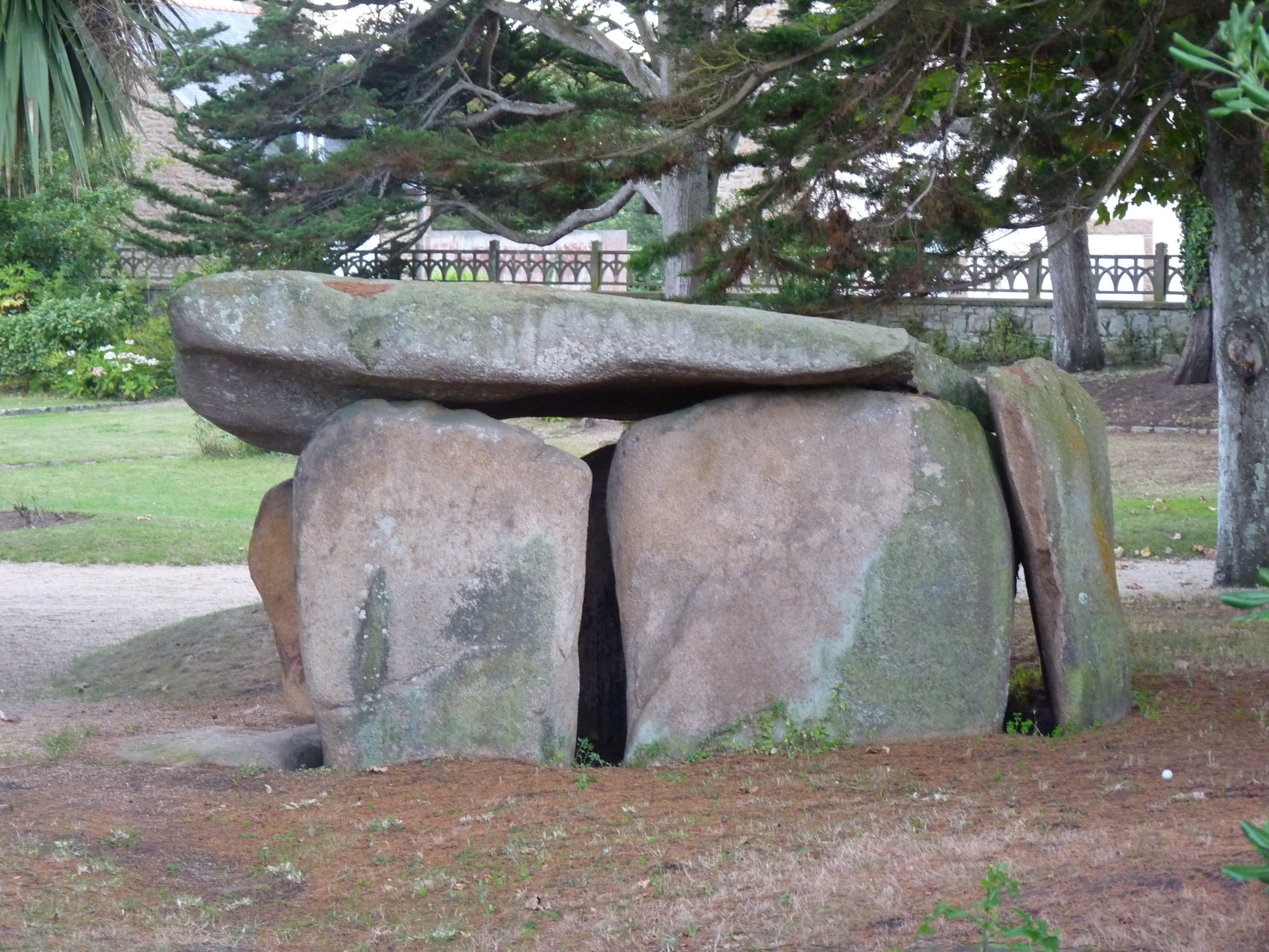 Situé à Trébeurden